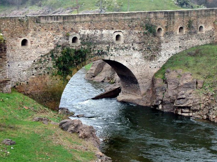 El río Lozoya pasando bajo el Puente Viejo o del Arrabal en Buitrago del Lozoya